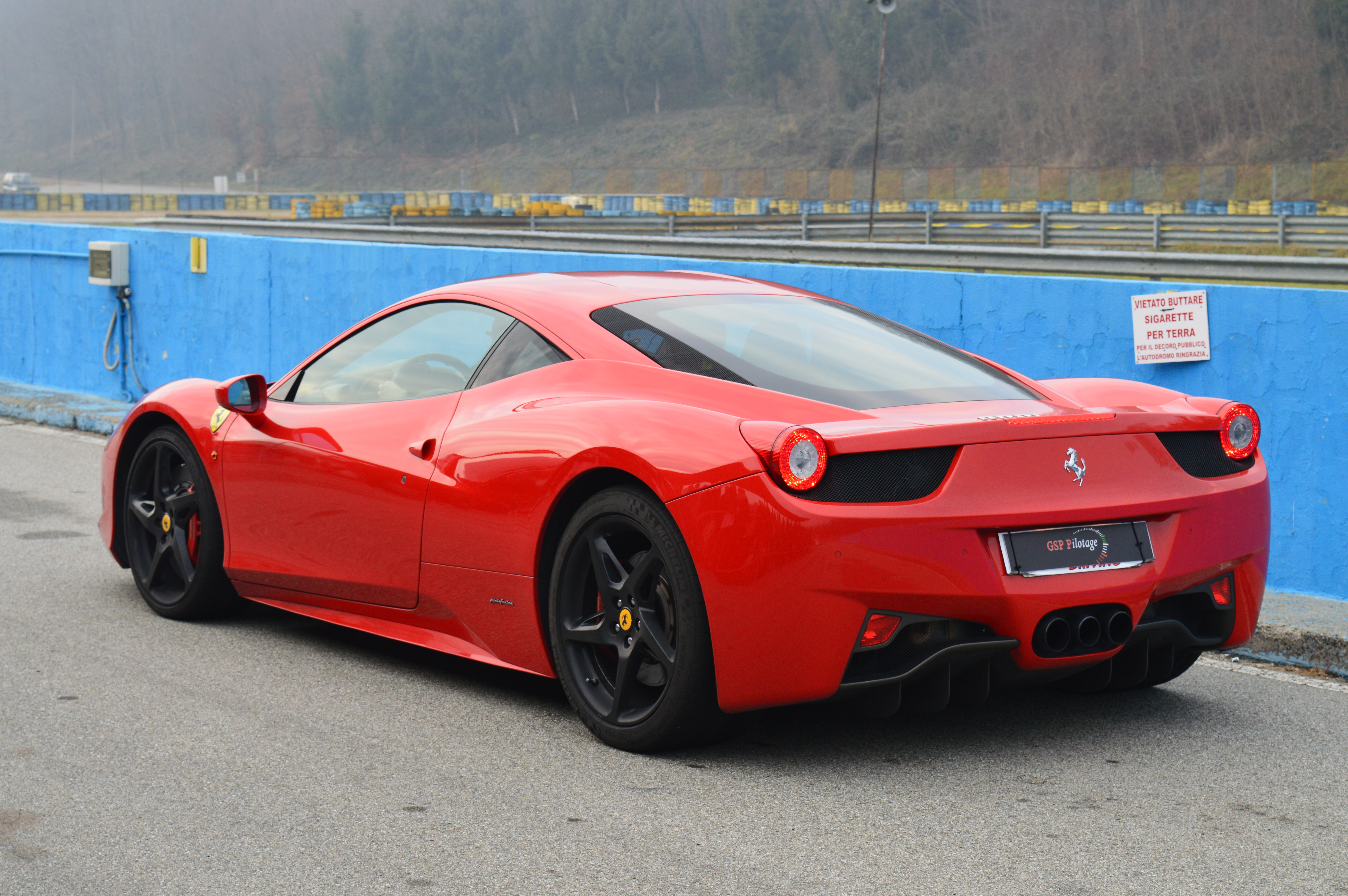 Ferrari f458 Italia nel circuito di Lombardore.